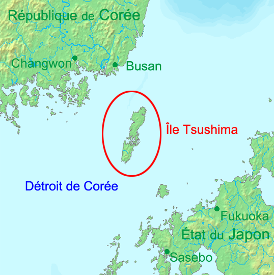 Les îles Tsushima et l'île Iki classées comme parc national, dans la préfecture de Nagasaki, Japon.